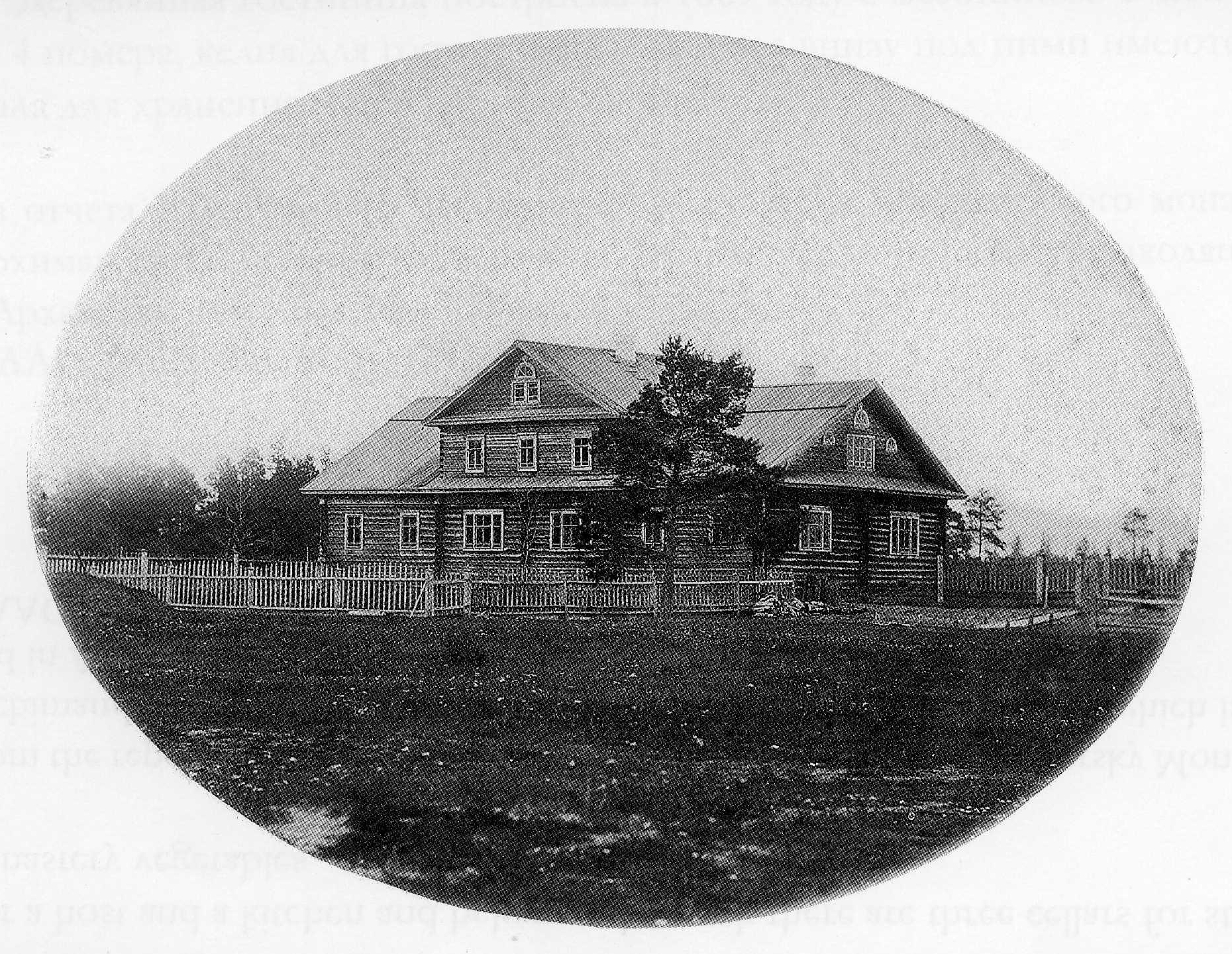 Архангельский уезд. Пертоминский монастырь. Гостиница.